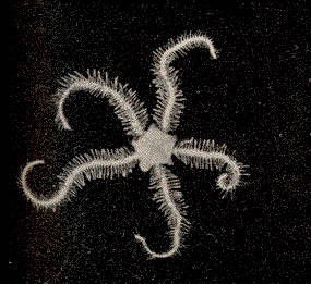 Ophiothrix angulata Ophiothrix angulata (Say, 1825) Angular Brittle Star